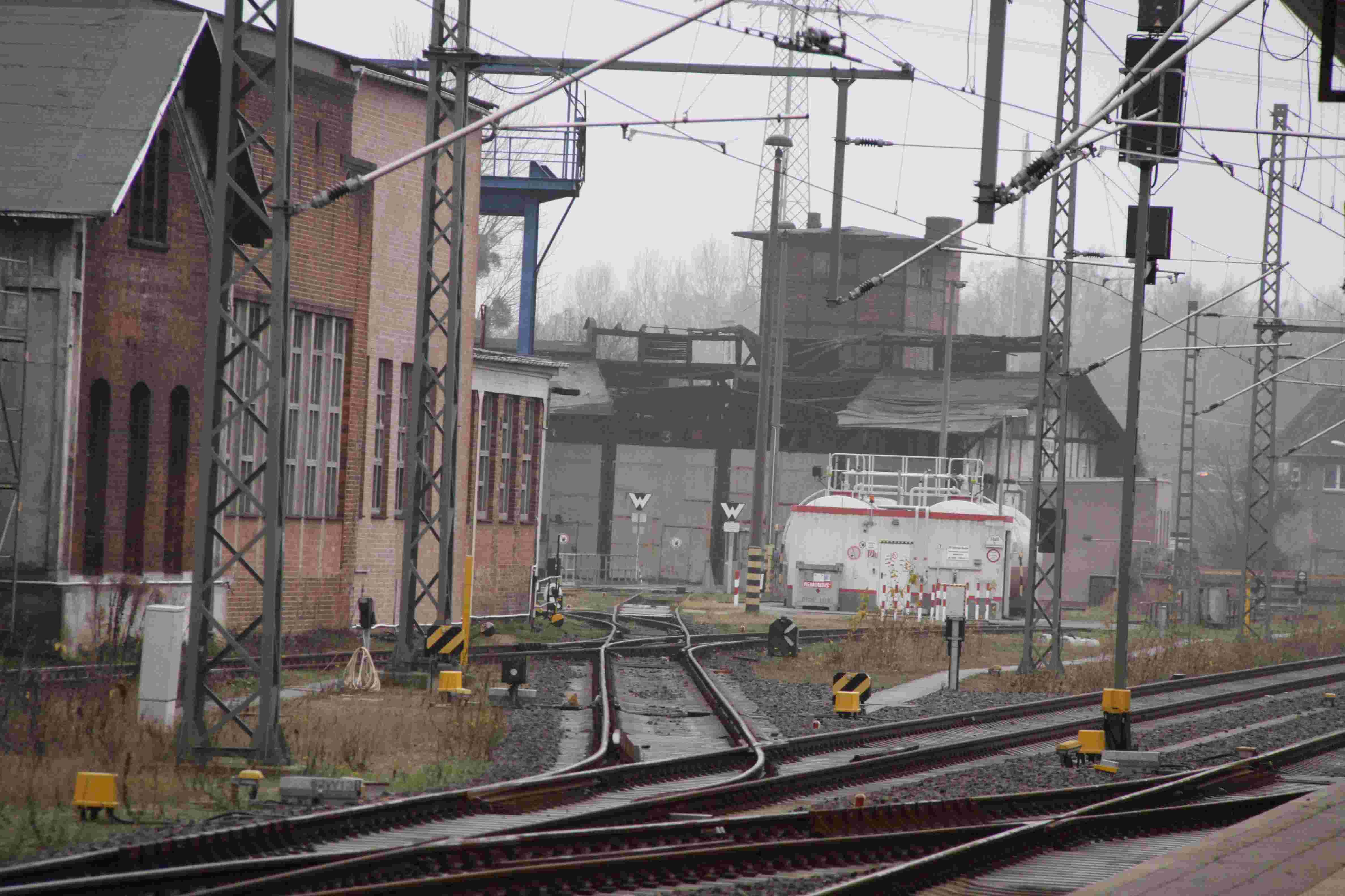 Zufahrt zum ehemaligen Bw Schwerin